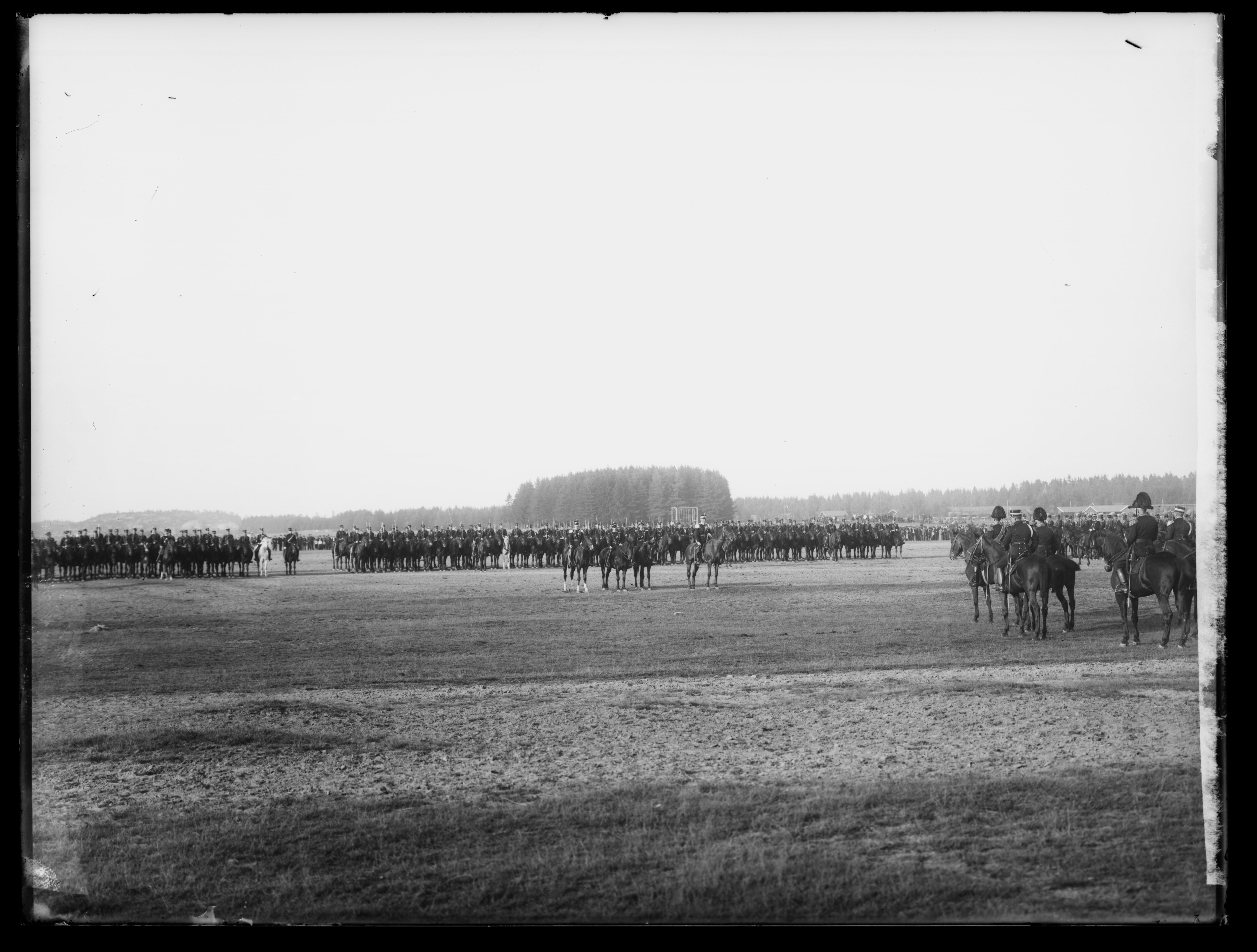 Bildet er hentet fra Nasjonalbibliotekets bildesamling. Anmerkninger til bildet var: Påskrift arkivark: Jubilæumsfæsten Gardermoen Eldste arkivnummer: 958 Yngre arkivnummer: 169, 308 Gardermoen, Ullensaker, Akershus